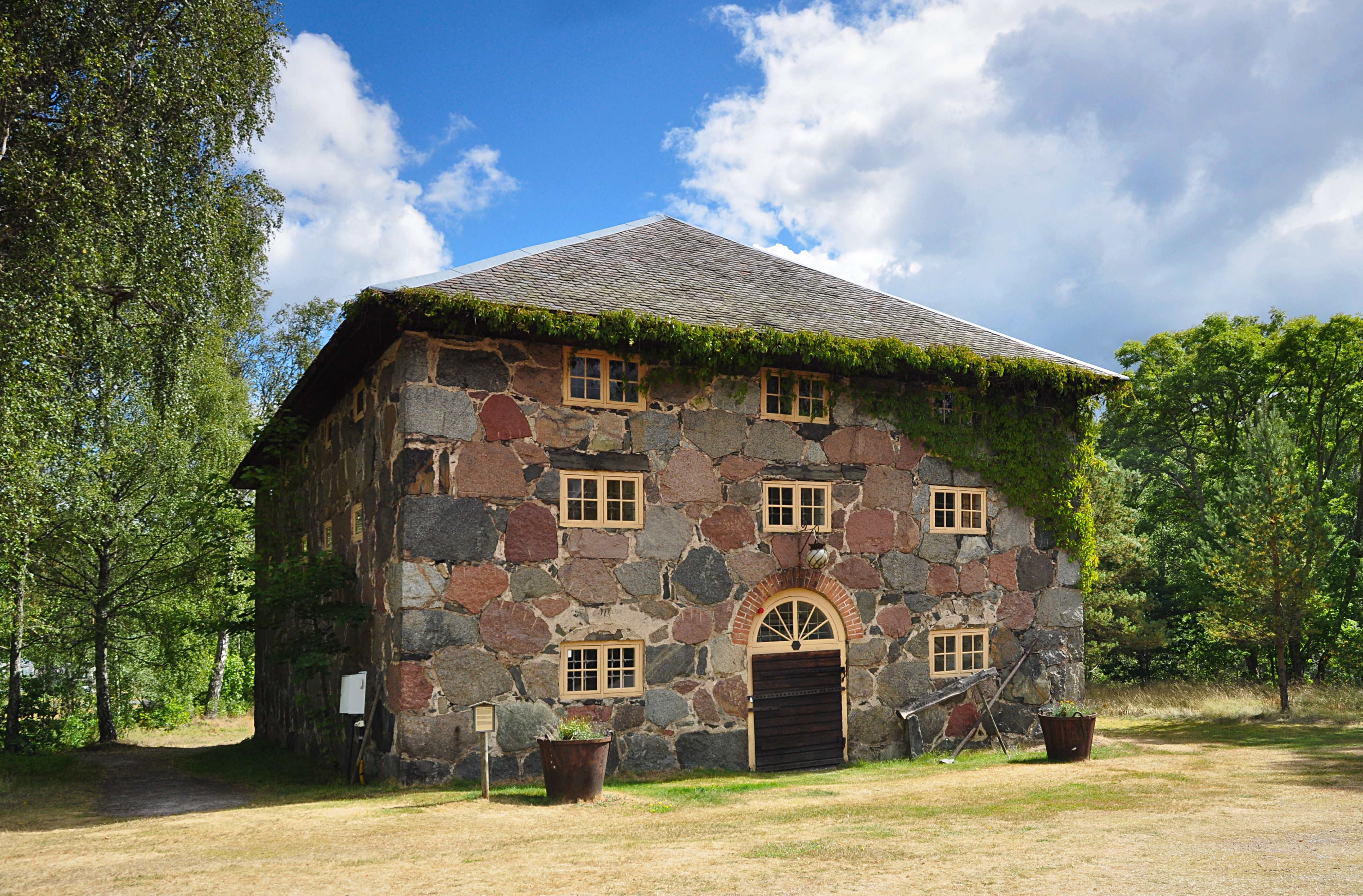 Ädelfors mineral- och gruvmuseum. Vetlanda, Ädelfors